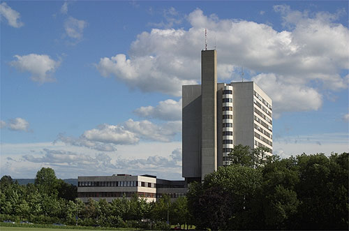 Kantonsspital Bruderholz (Binningen/Bottmingen)